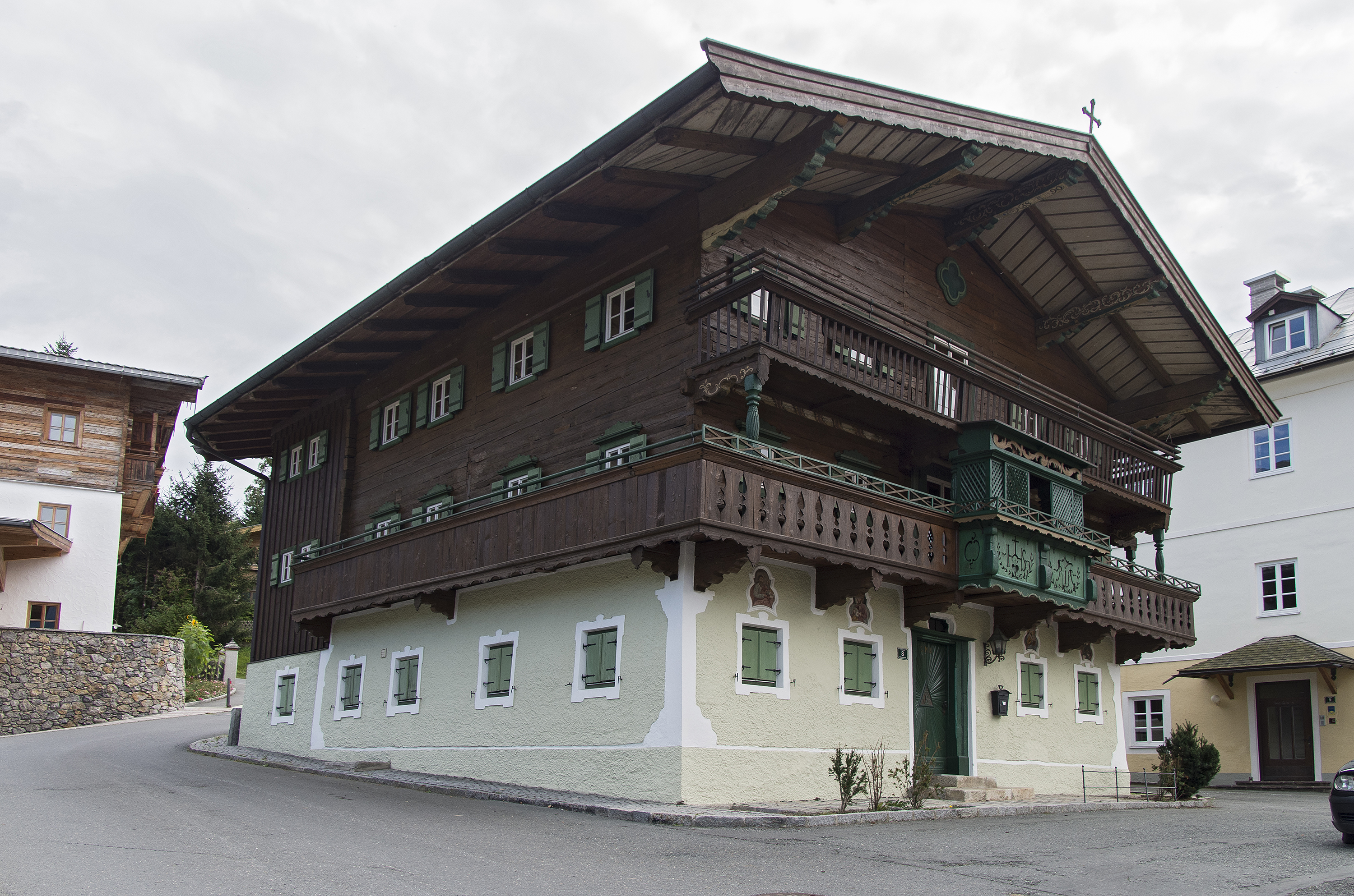 Bürgerhaus, Krämerhaus